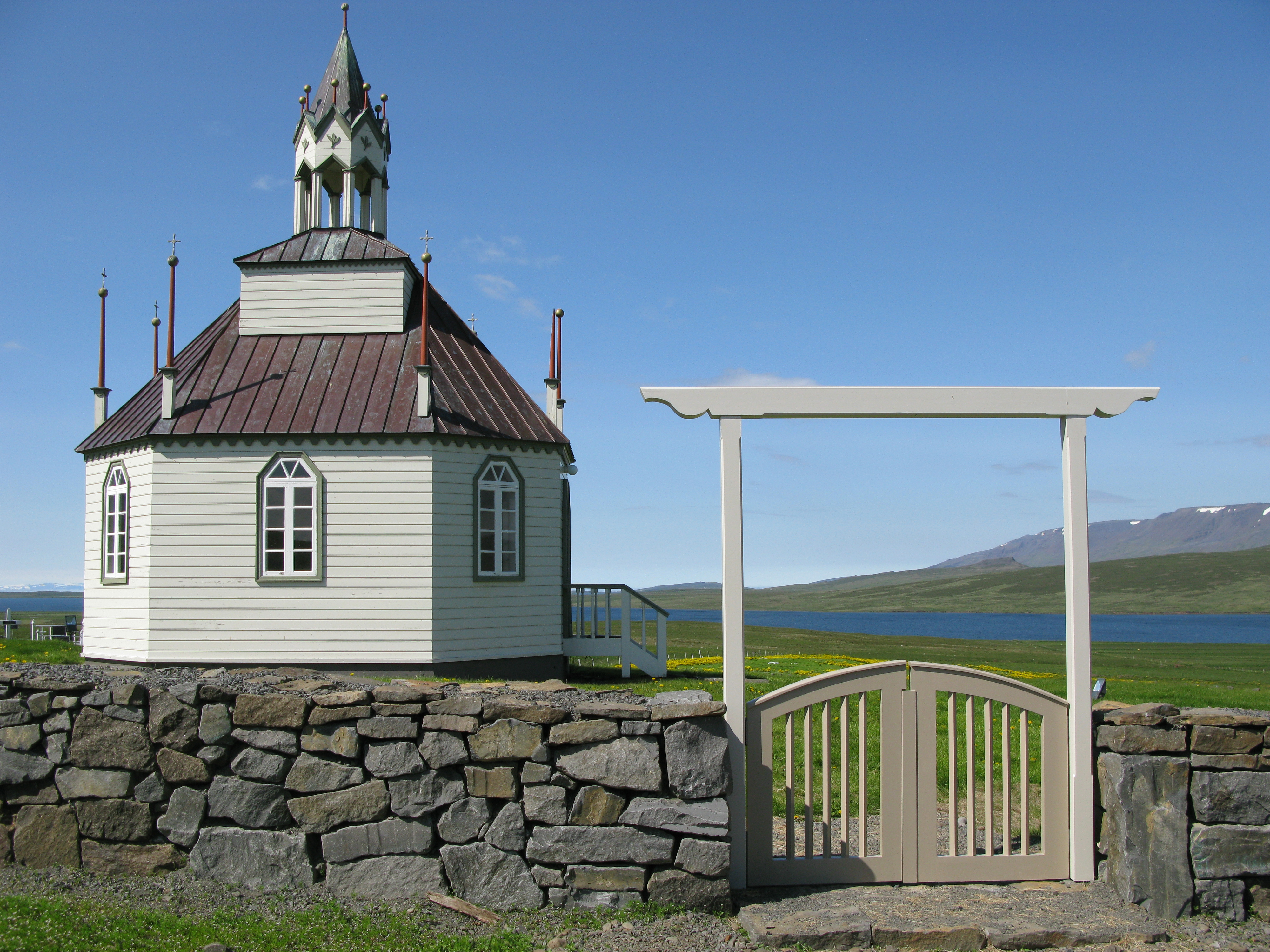 Kirkjan var vígð árið 1894 og var bærinn Auðkúla prestssetur allt til ársins 1952.